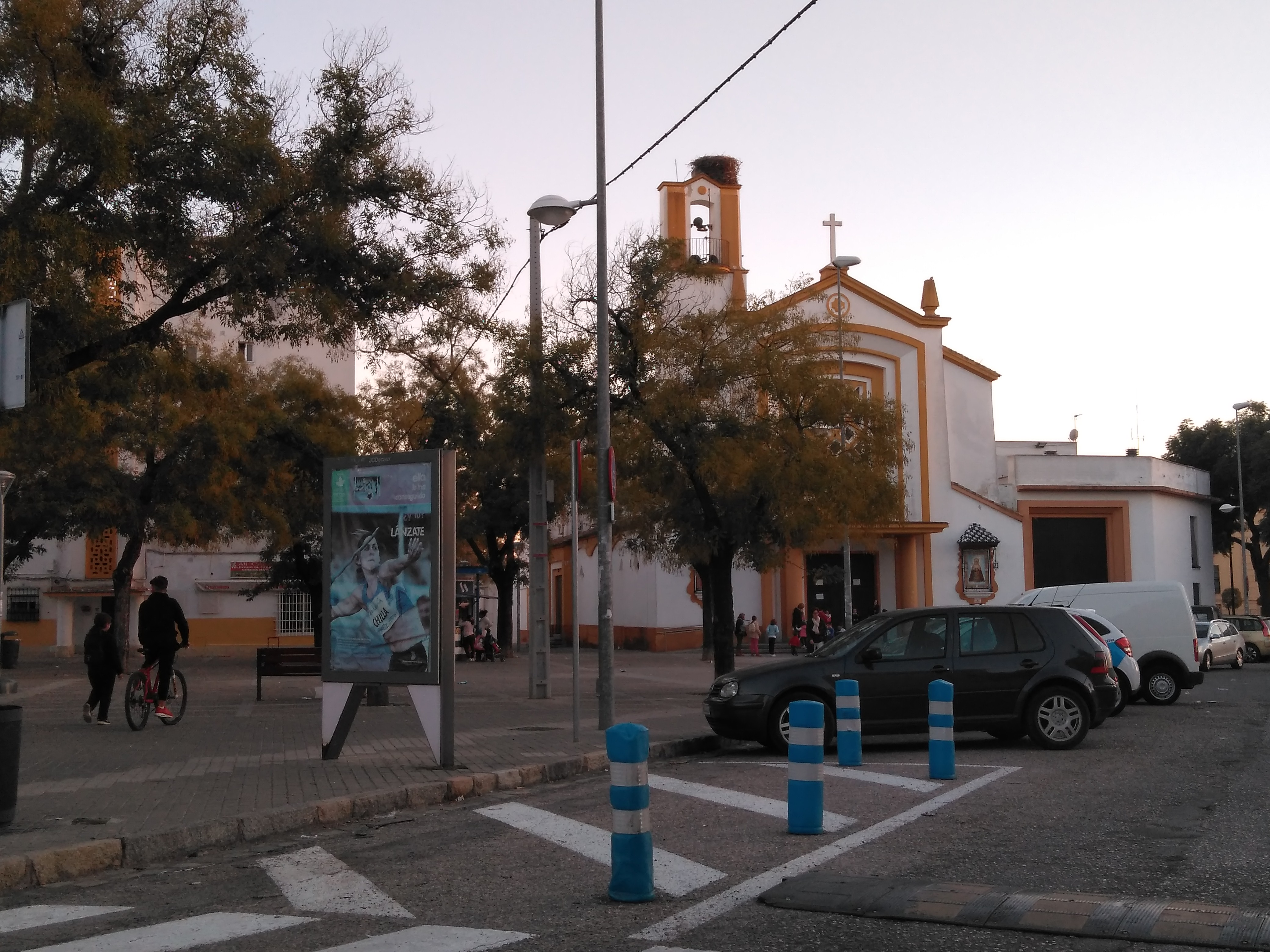 marquesina con cartel de Mercedes Chilla junto a la Iglesia de Santa Ana en Jerez de la Frontera, España